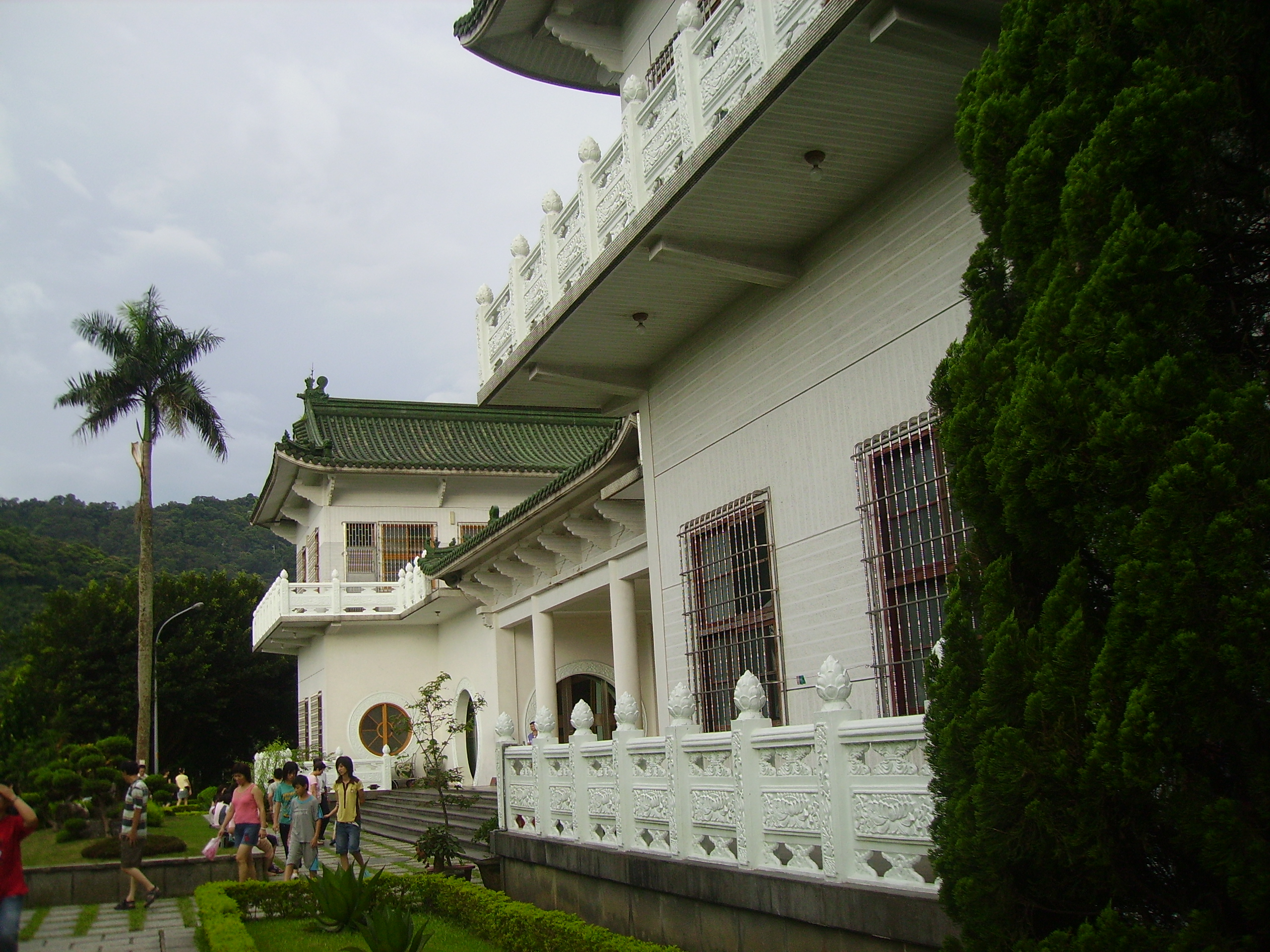 新北市土城區承天禪寺。